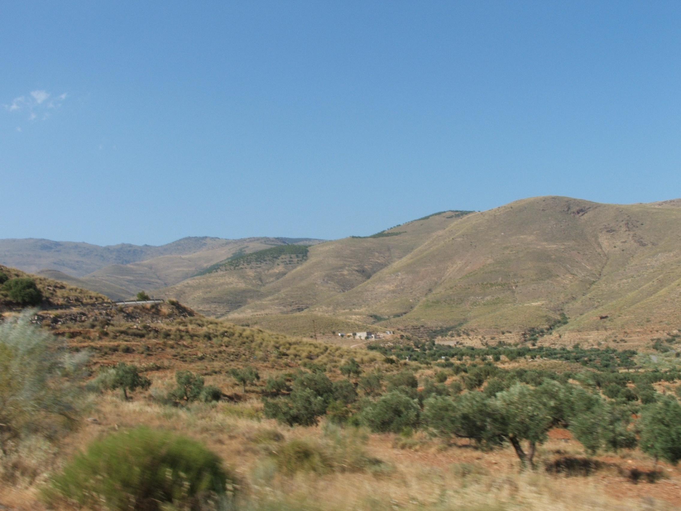 Unas colinas en los Filabres, cerca de Aulago.